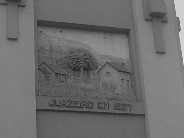 Fototirada pelo cooperador no centro de Juazeiro do Norte